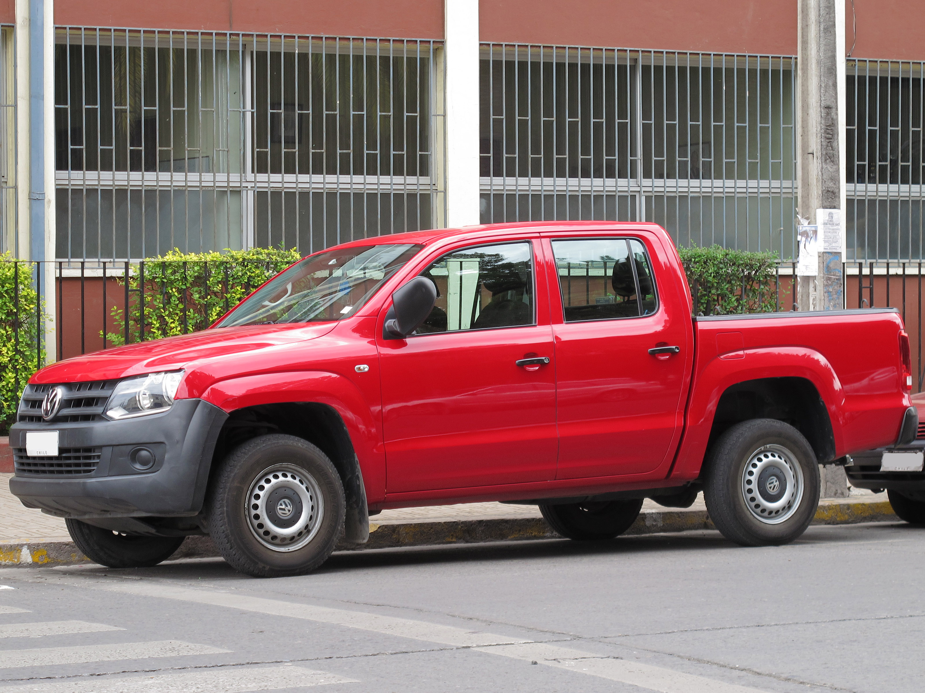 Volkswagen Amarok 2.0 TDi Power 2012